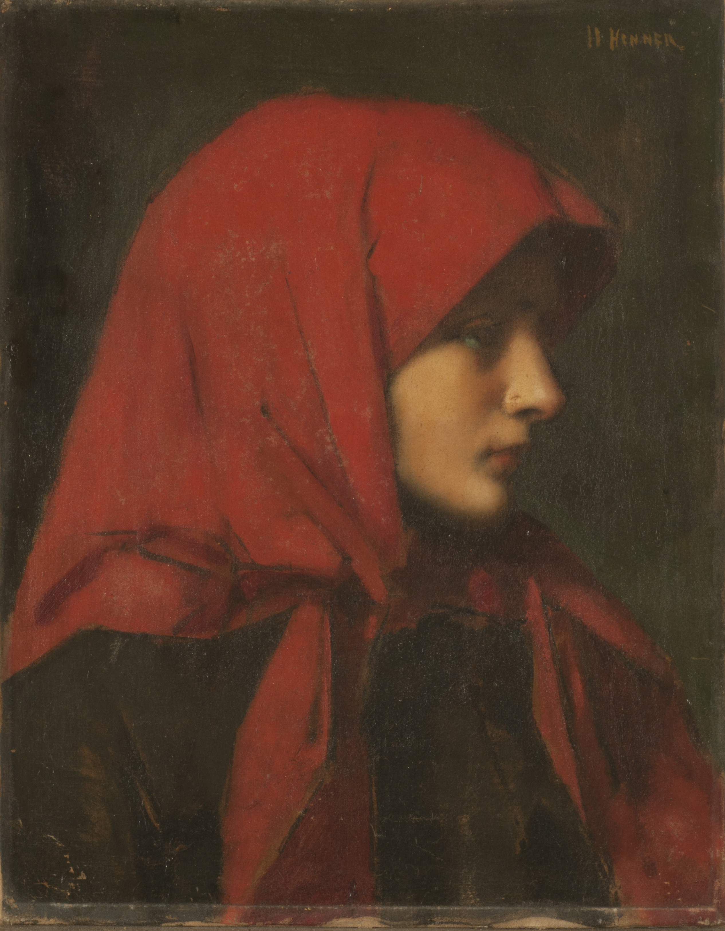 Jean-Jacques Henner, Paysanne (Femme capuchon rouge). Siglo XIX. 41,5 x 32,5 cm, con marco: 70 x 61 x 9 x 15 cm, óleo sobre tela. Inv. 2722.